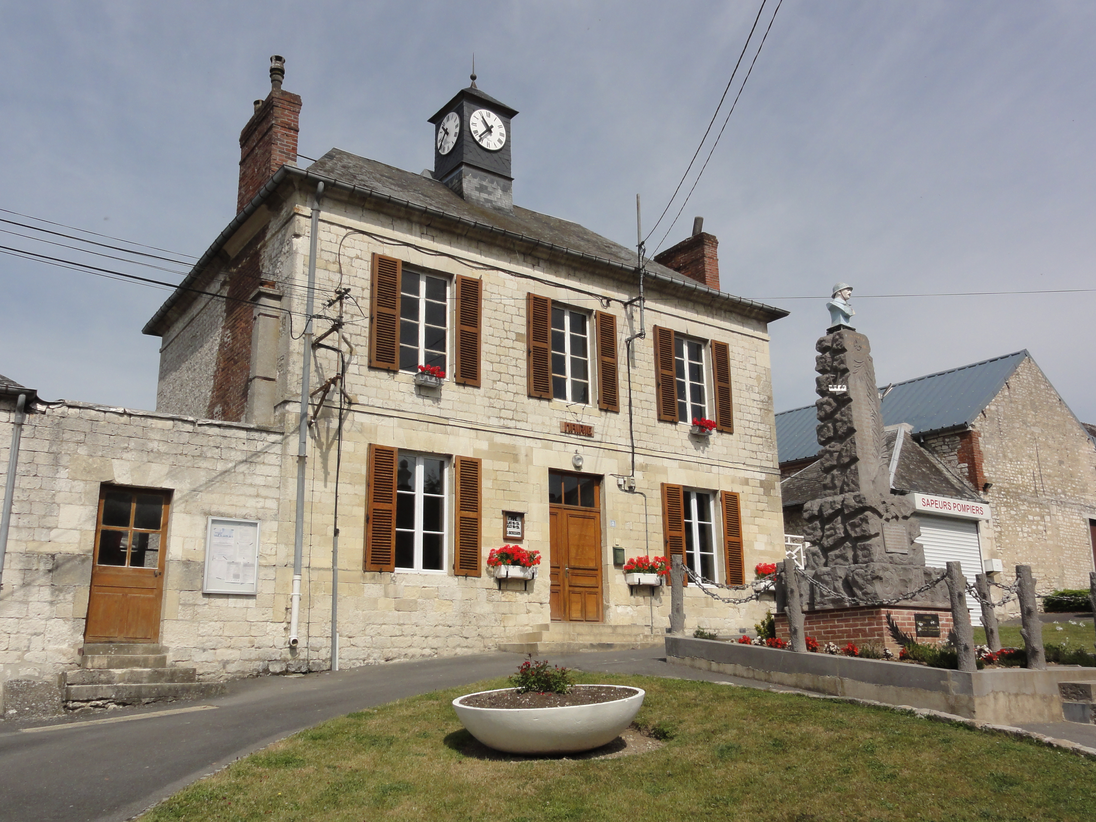 Boncourt (Aisne) mairie